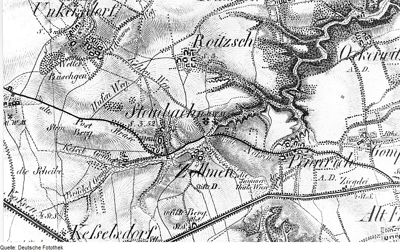 Original image description from the Deutsche Fotothek Dresden-Gompitz-Steinbach. Oberreit, Sect. Dresden, 1821/22